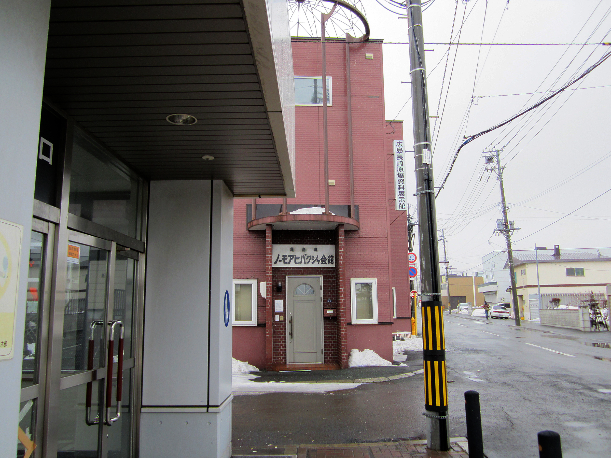 函館本線平和駅南口に隣接したノーモア被曝者会館